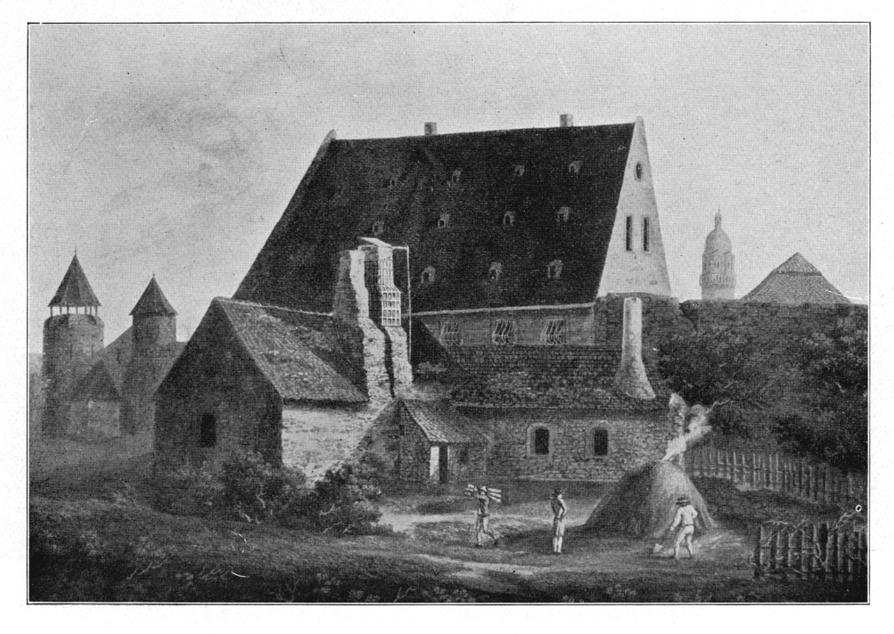 Ansicht der Höchster Porzellanfabrik